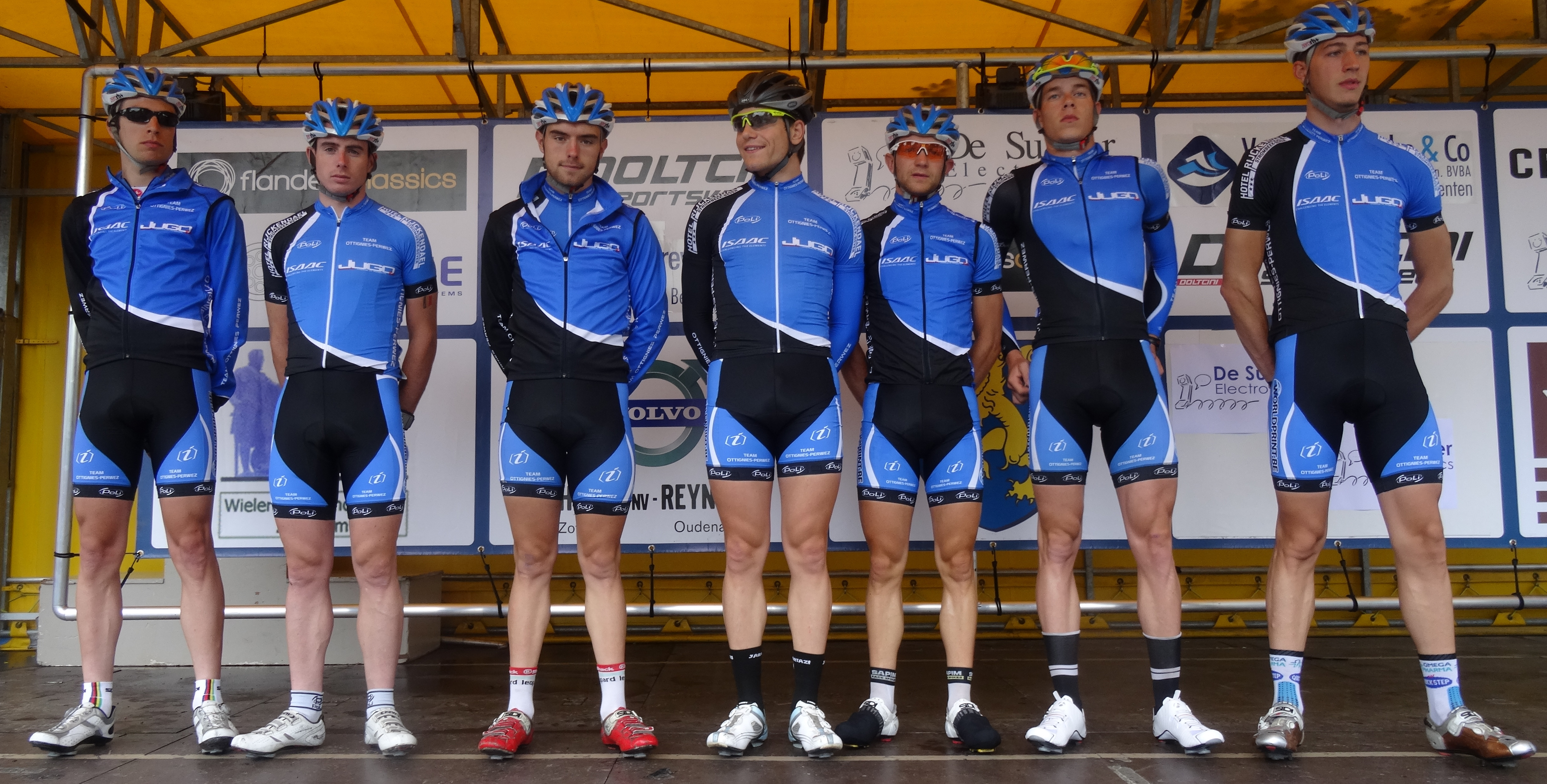 Reportage photographique réalisé le samedi 5 juillet à l'occasion du départ et de l'arrivée du Circuit Het Nieuwsblad espoirs 2014 à Grotenberge (Zottegem), Belgique.